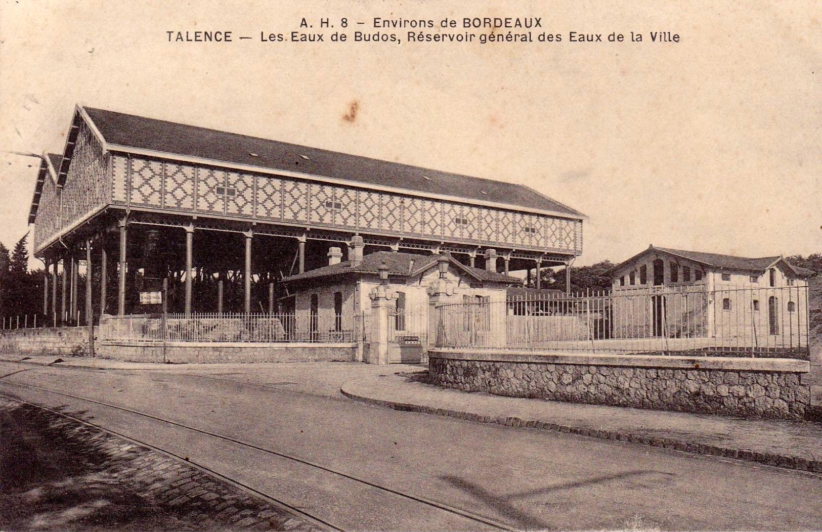 Talence